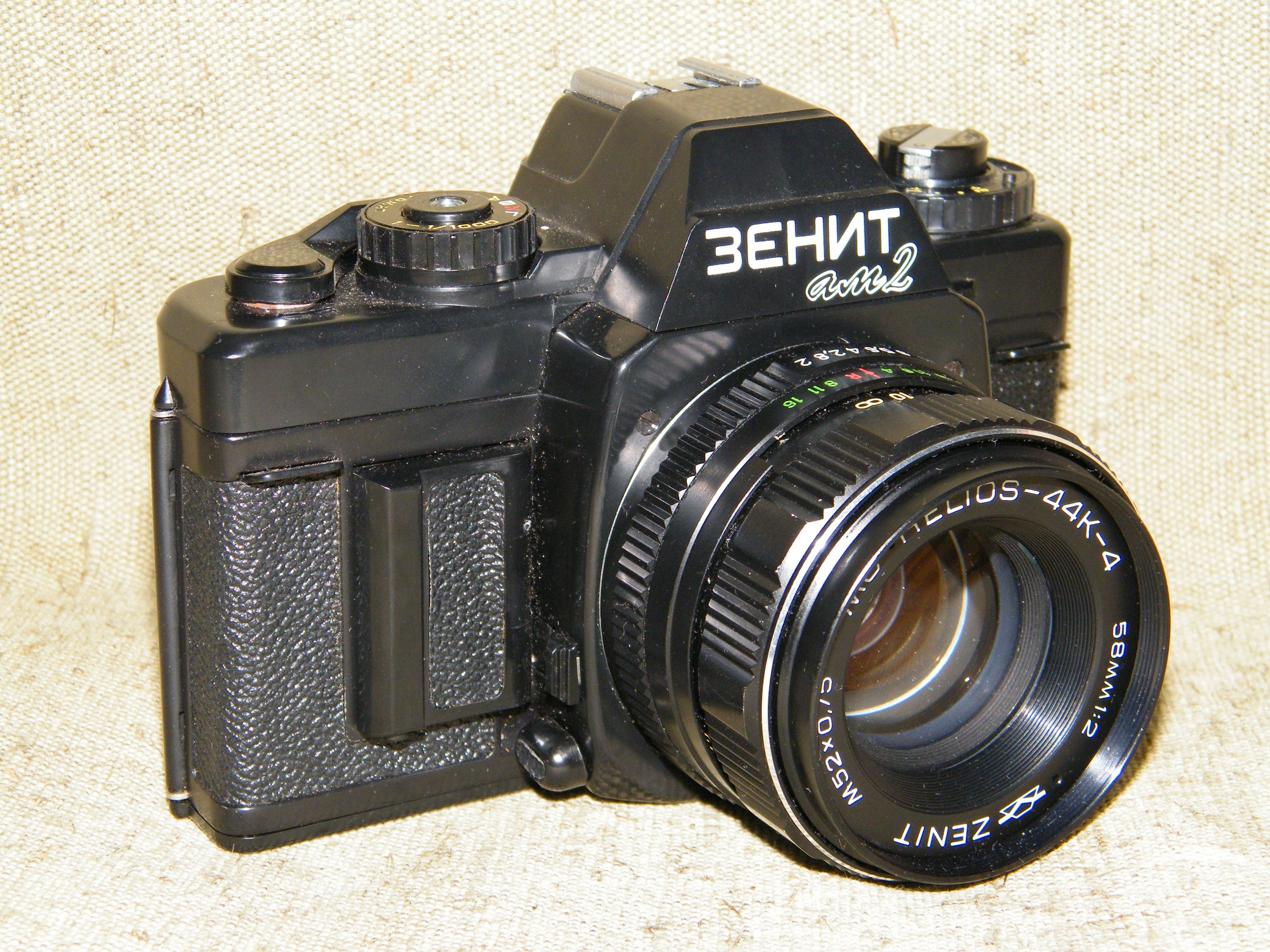 Zenit am2